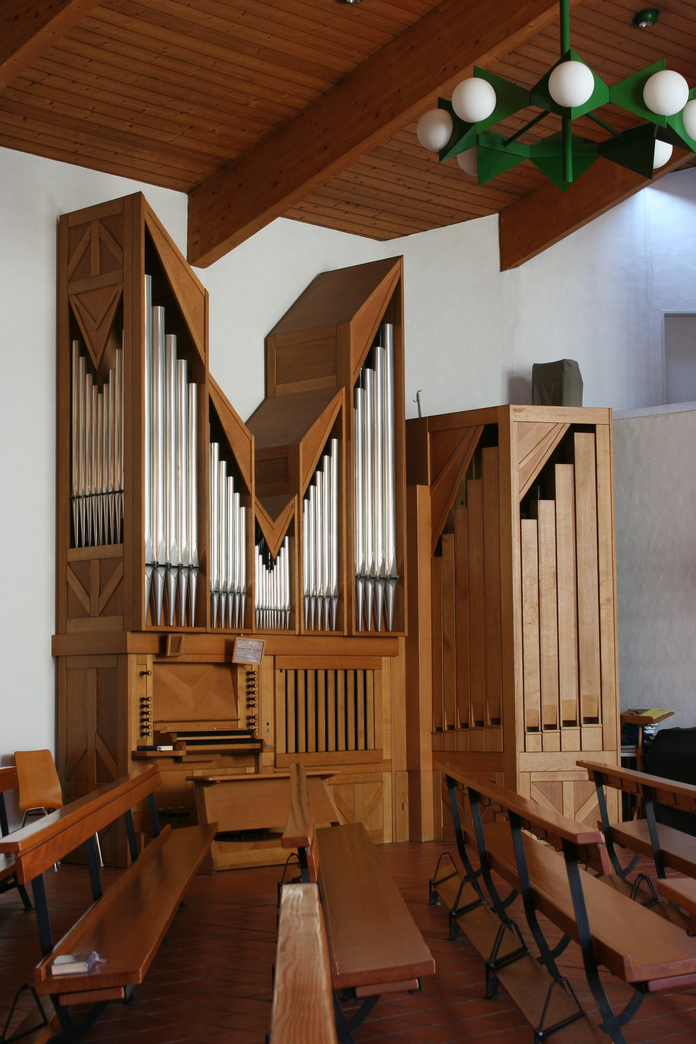 Römisch-katholische Pfarrkirche St. Georg Elgg, Orgel